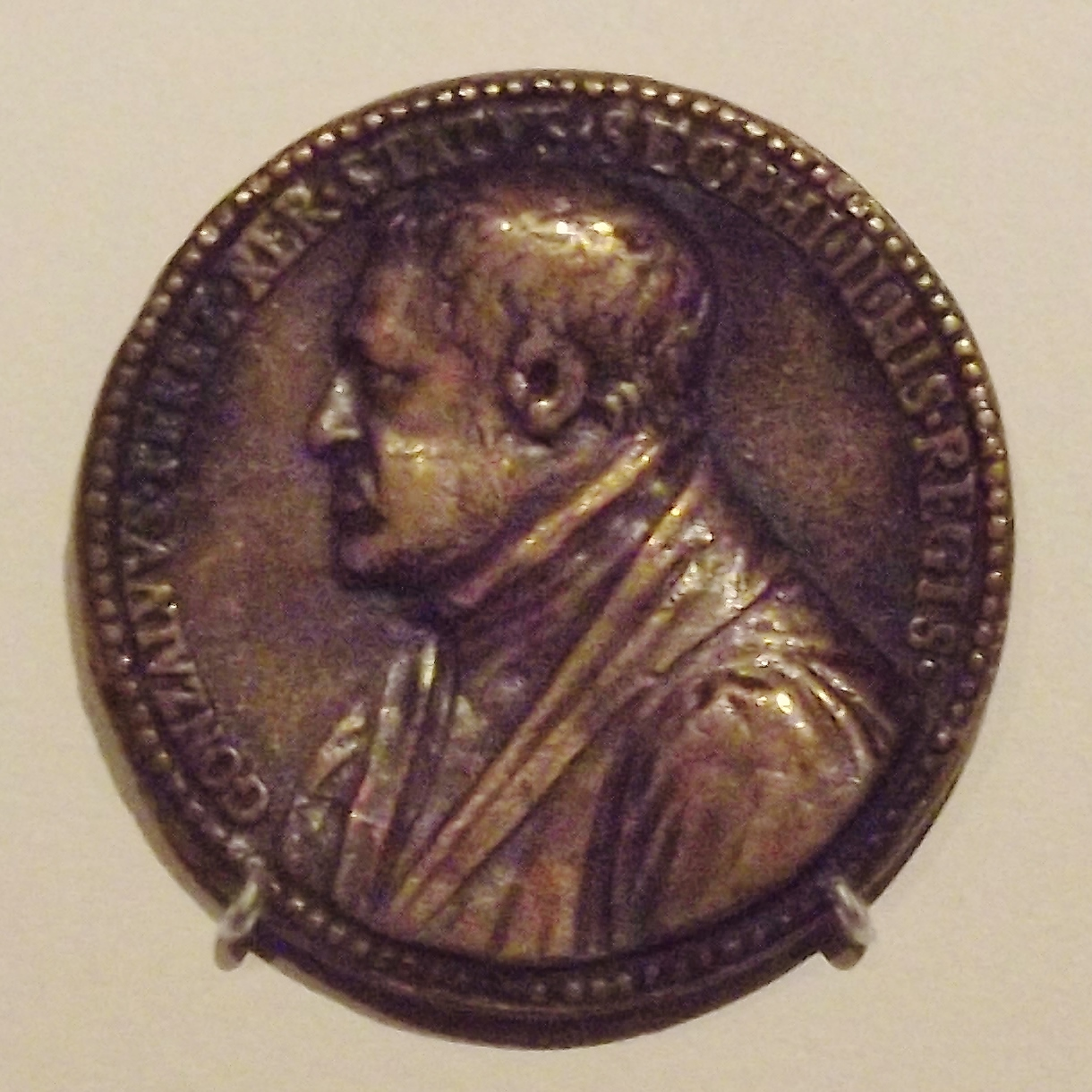 Anverso de Medalla conmemorativa con el busto de Gonzalo Pérez, secretario de Felipe II. GONZALVS · PEREZ · RER · STATVS · SEC · PHI · II · HIS · REGIS